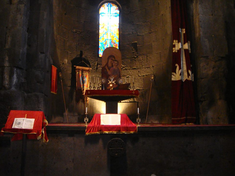 Սուրբ խաչ